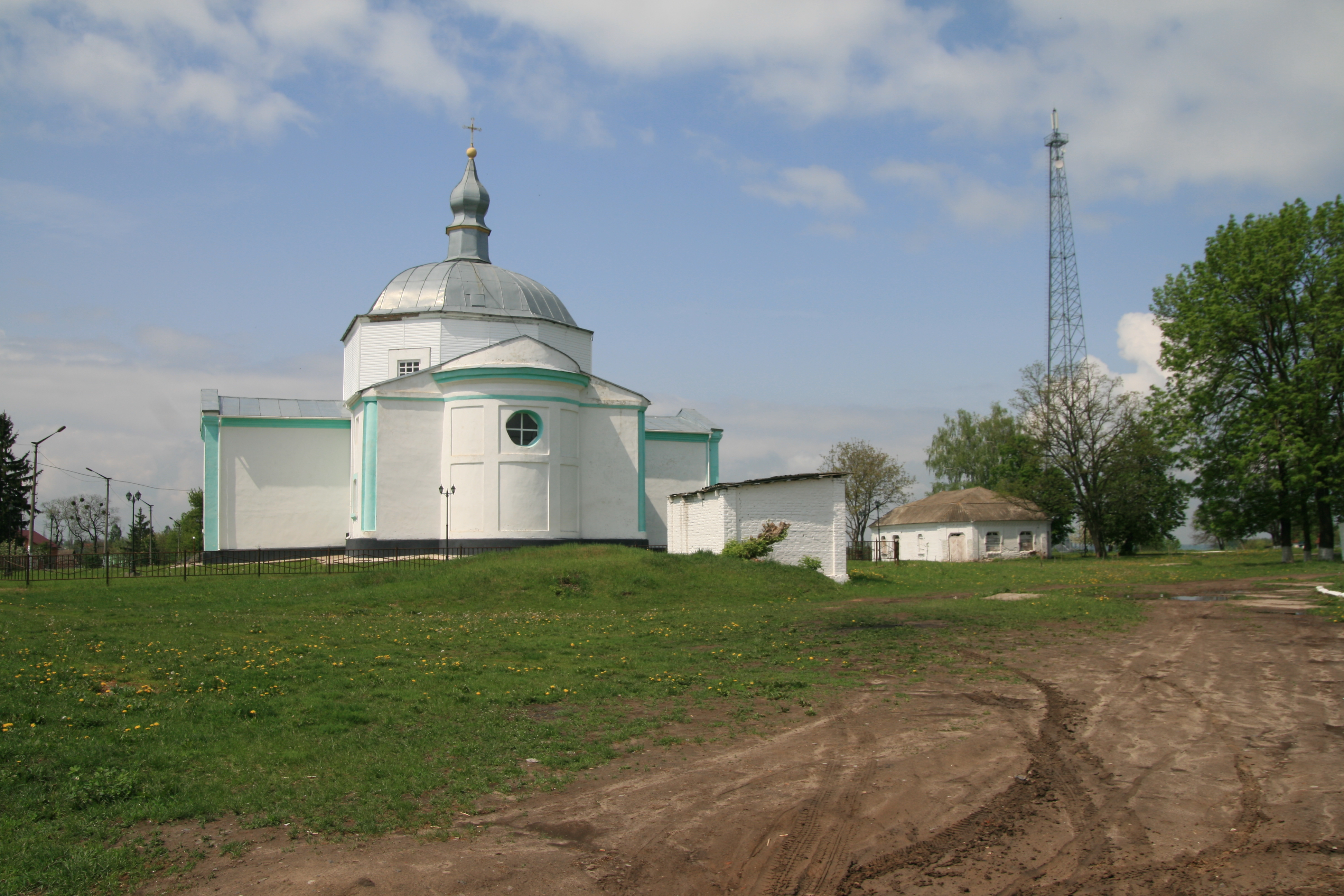 Успенська церква (мур.), с. П'ятигори, Барабан церкви облицовано слайдінгом